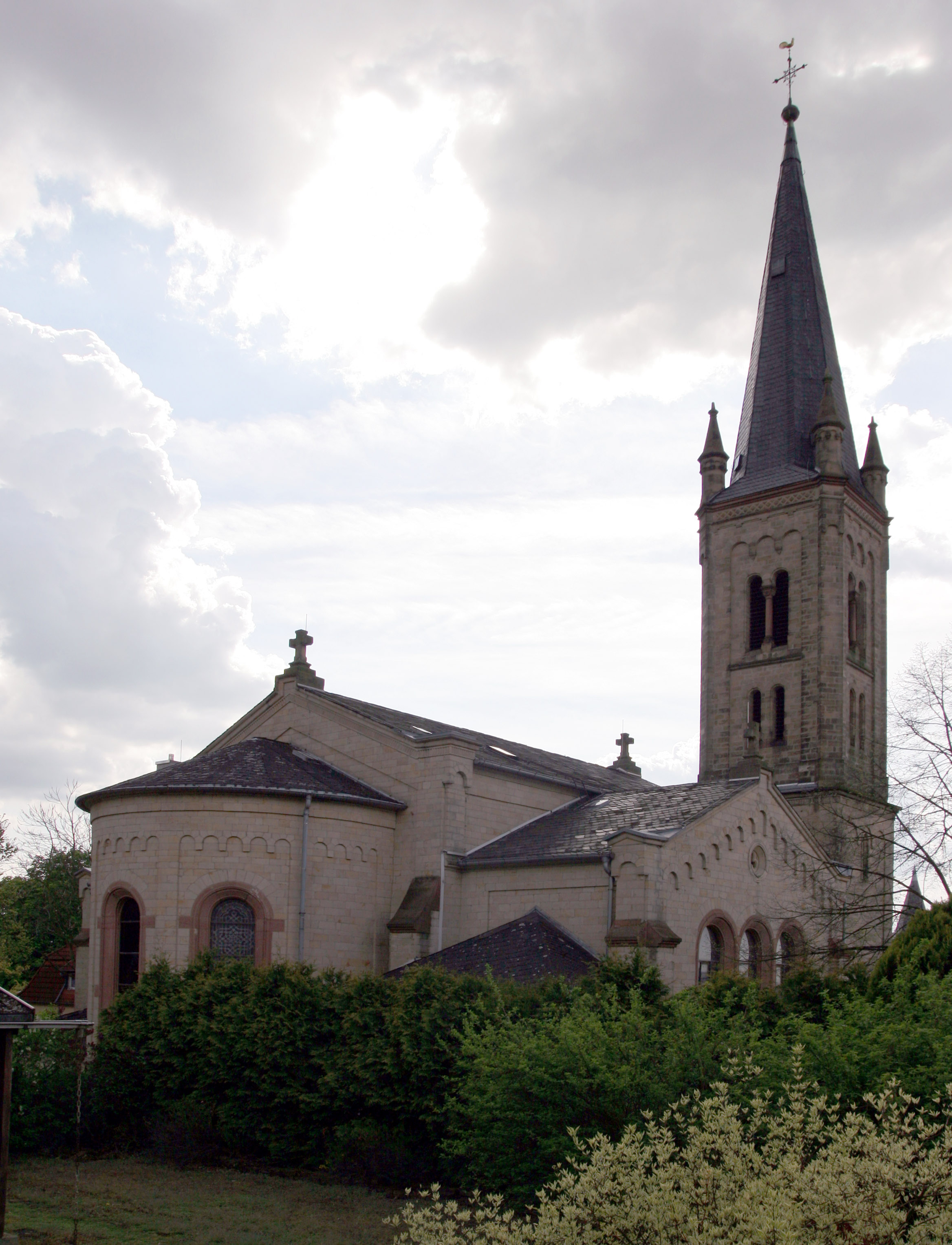 Die unter Denkmalschutz stehende Michaelskirche der Stadt Bensheim